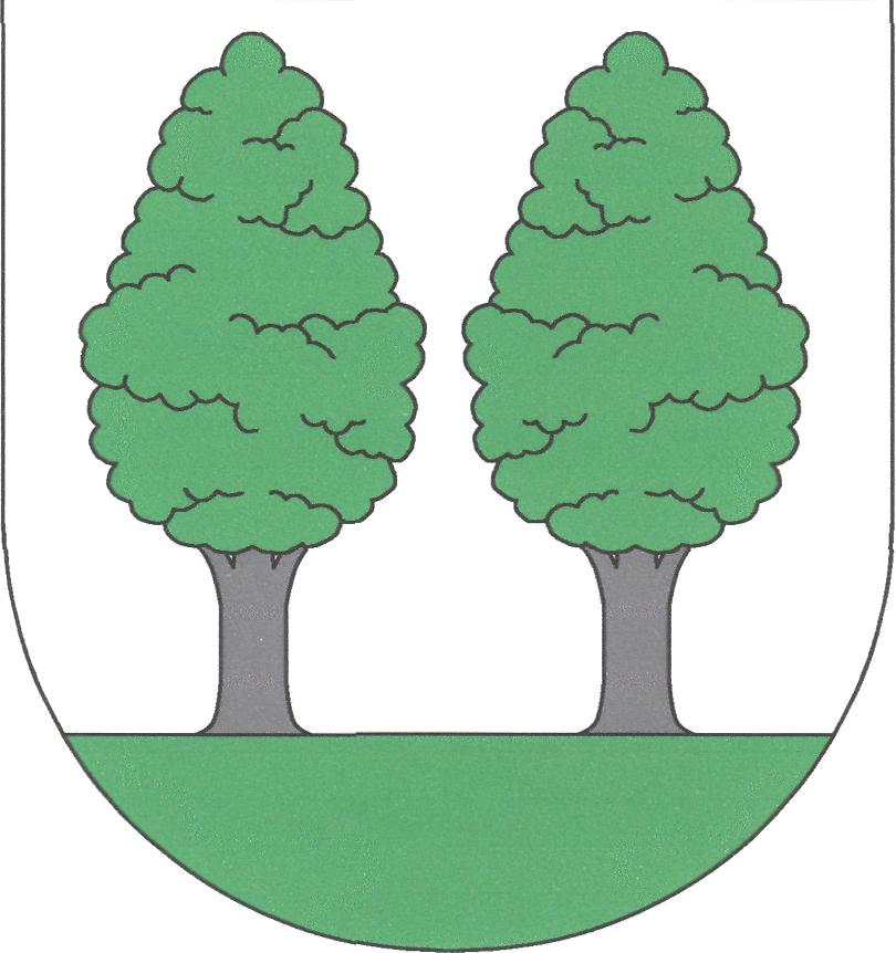 Znak obce Plaňany